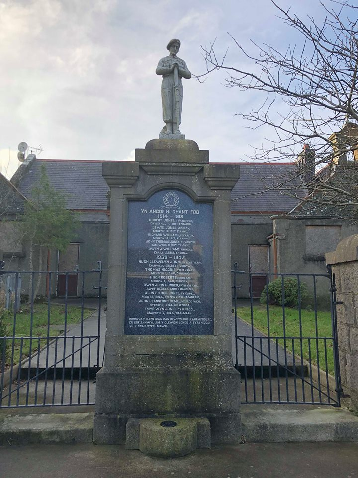 Cofeb ryfel Llanrhuddlad